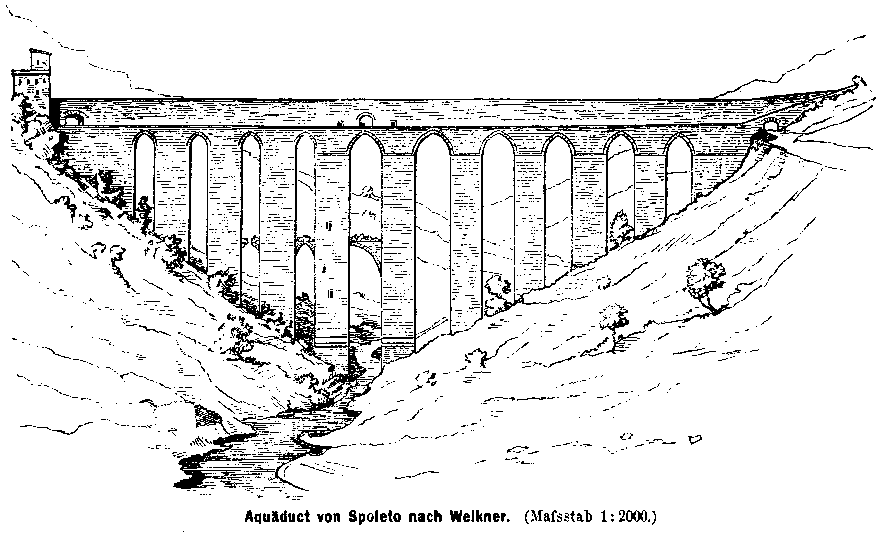 Das Äquaduct von Spoleto